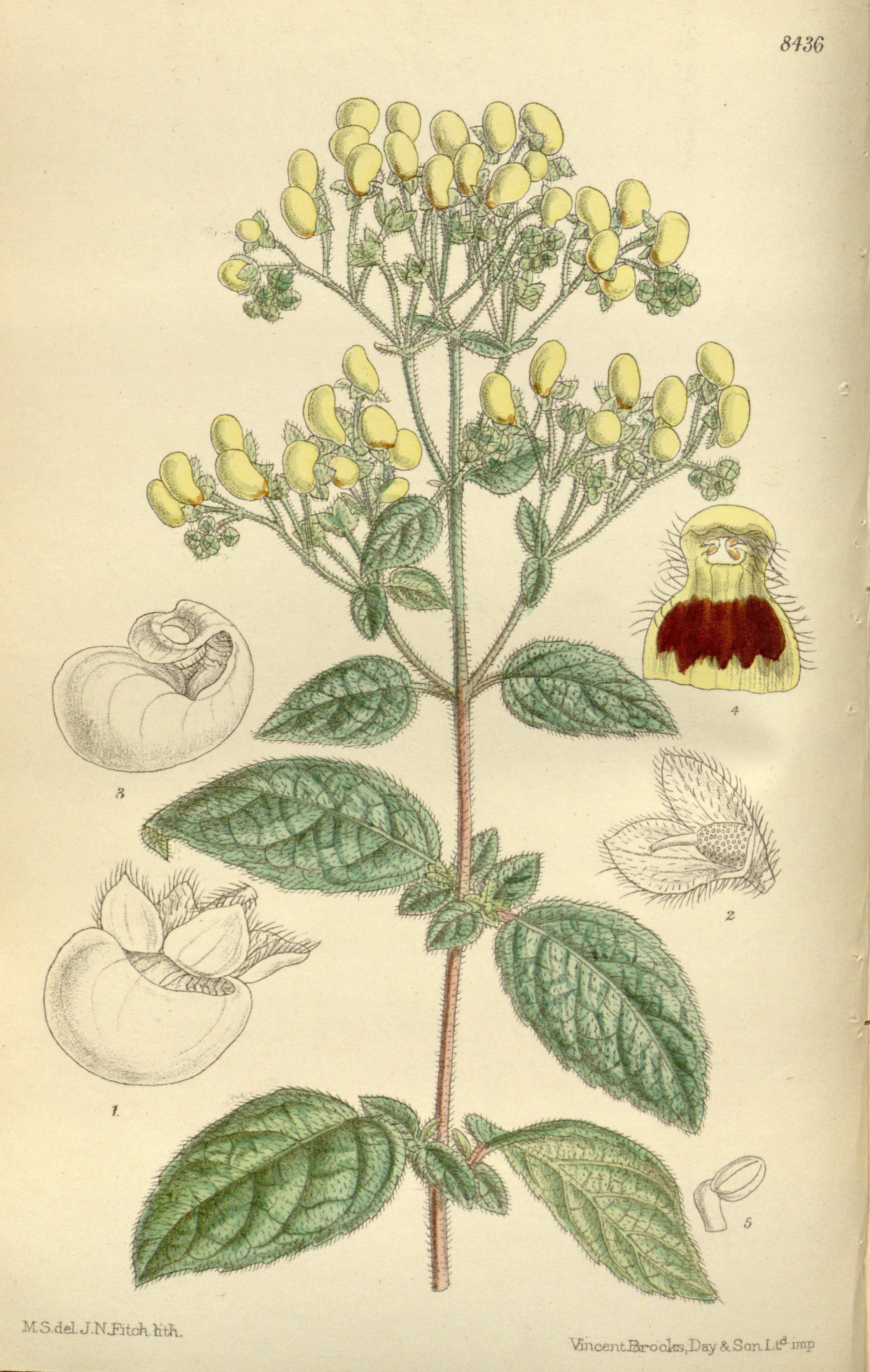 Calceolaria forgetii (= Calceolaria virgata), Calceolariaceae